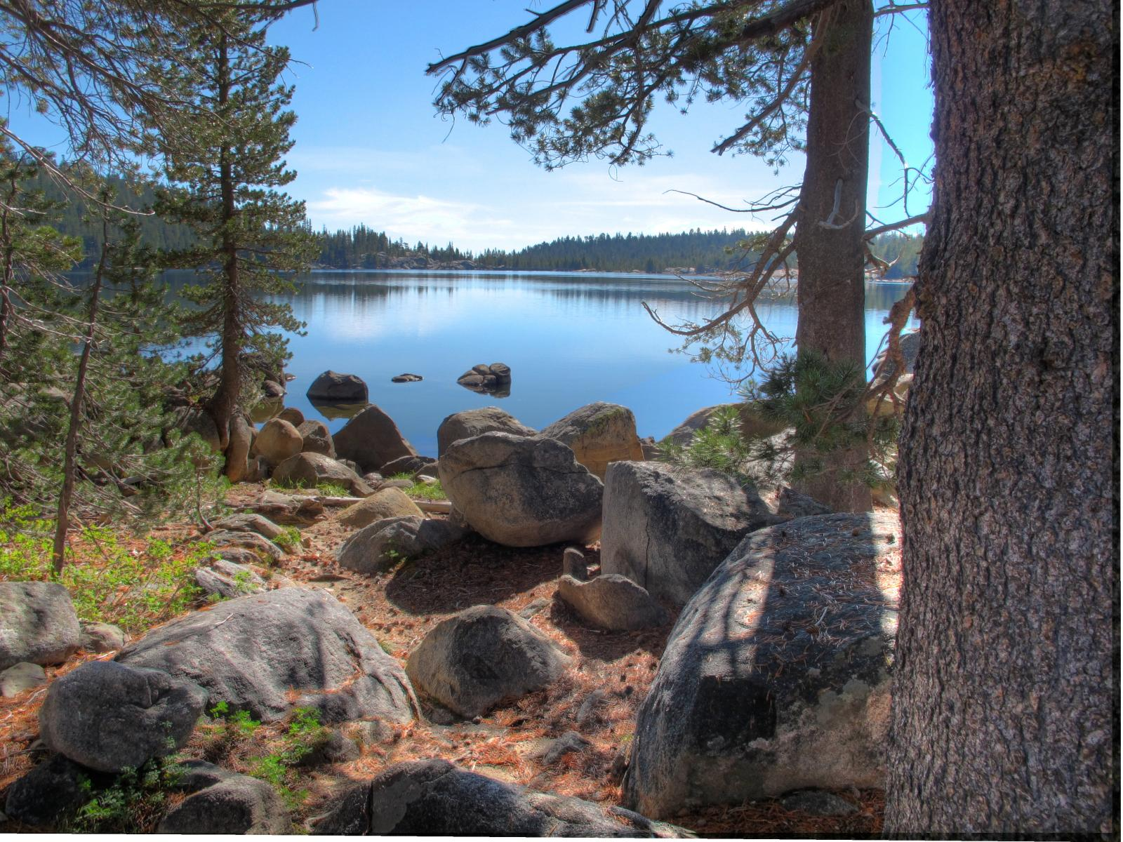 Lake Alpine, CA